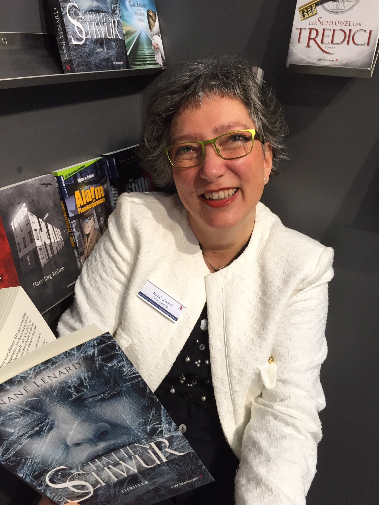 Schriftstellerin Nané Lénard auf der Leipziger Buchmesse 2015